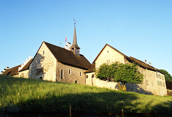 Das Ritterhaus in Bubikon, eine ehemalige Johanniterkommende